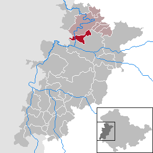 Krauthausen in Thuringia - Wartburgkreis